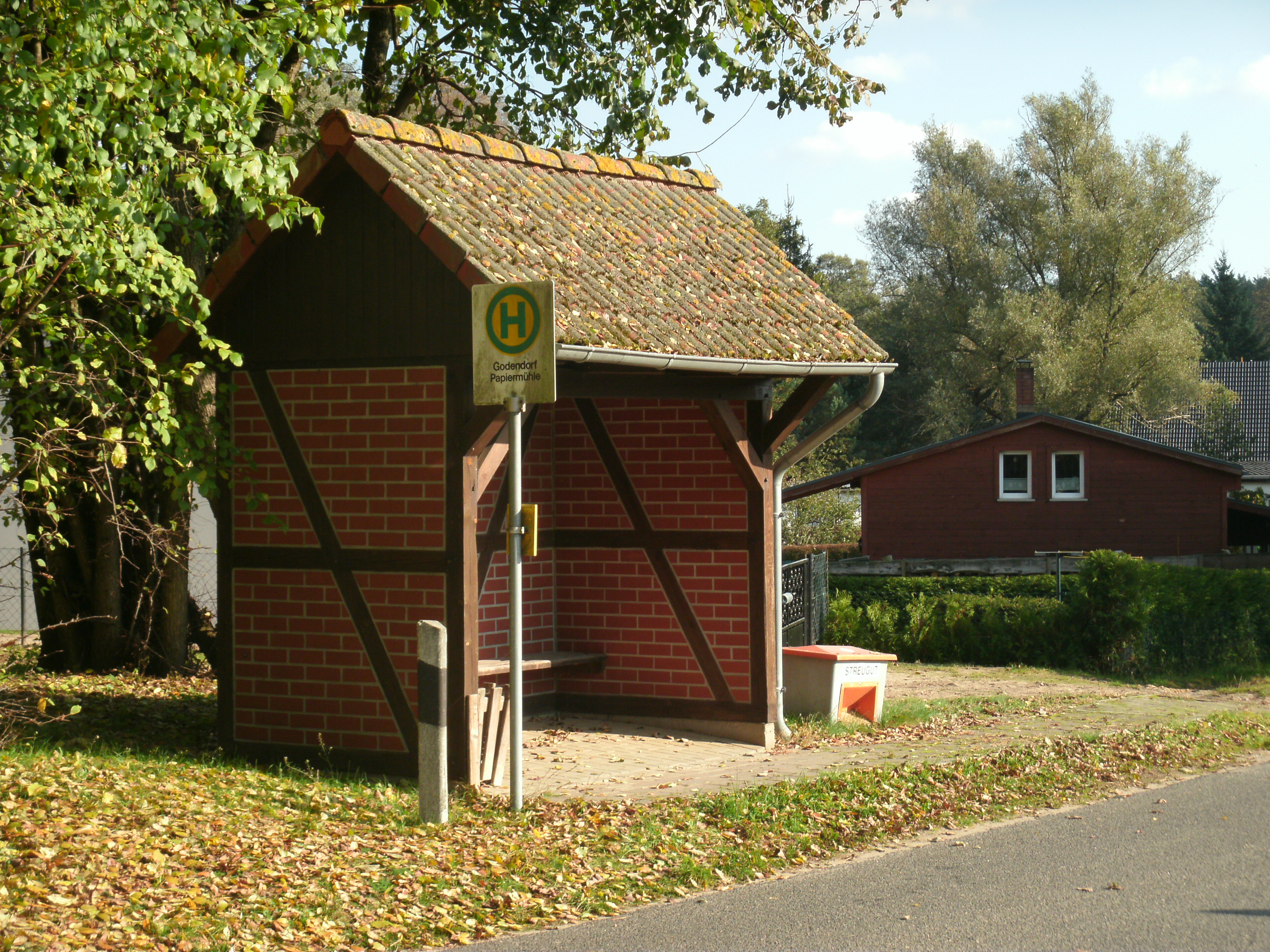 Bushaltestelle der Mecklenburg-Vorpommerschen Verkehrsgesellschaft (MVVG) in Godendorf, Papiermühle (Linie 640)